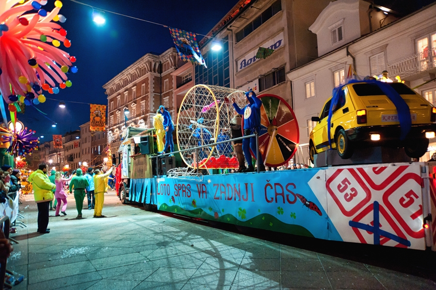 30. Riječki karneval